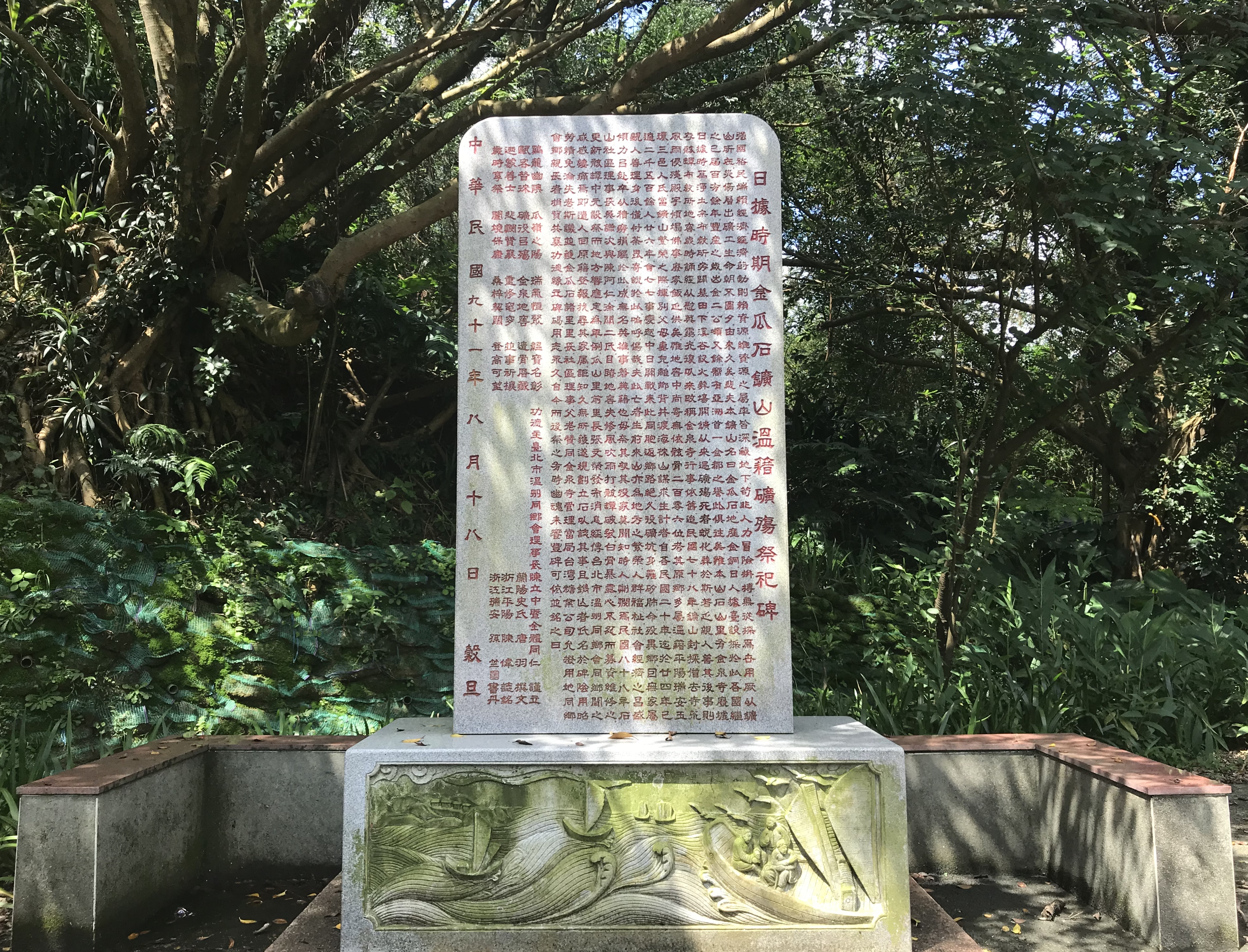 金瓜石礦山溫籍礦殤祭祀碑正面